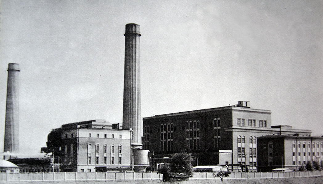 Vedere exterioară a Termocentralei Borzești.